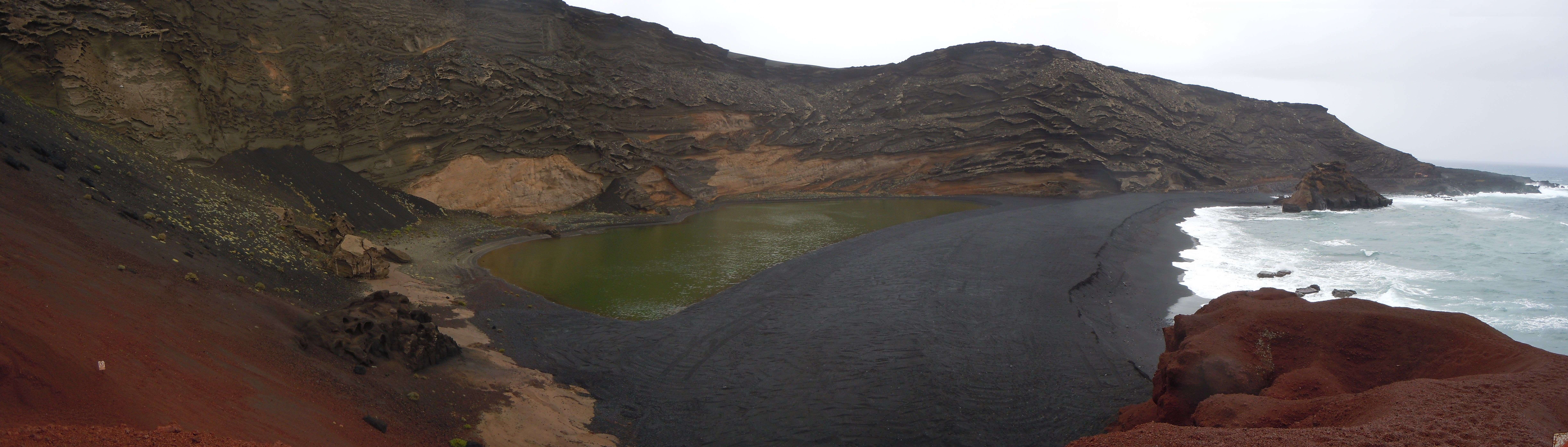 Charco de los Clicos, El Golfo, Lanzarote